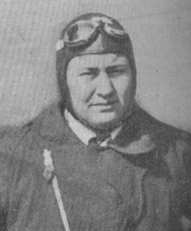 Aviatore italiano